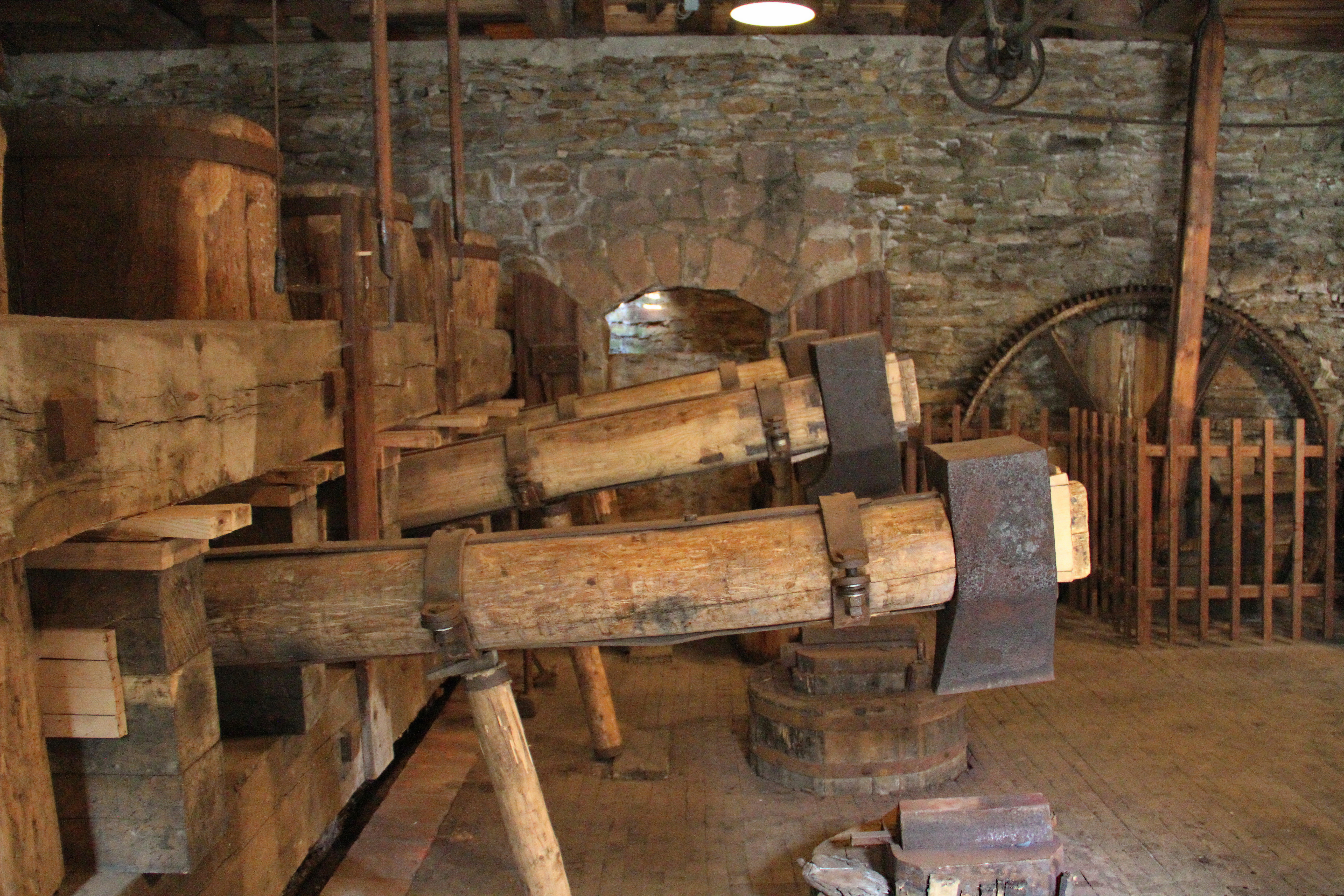 Hammerwerk Freibergsdorfer Hammer in Freiberg